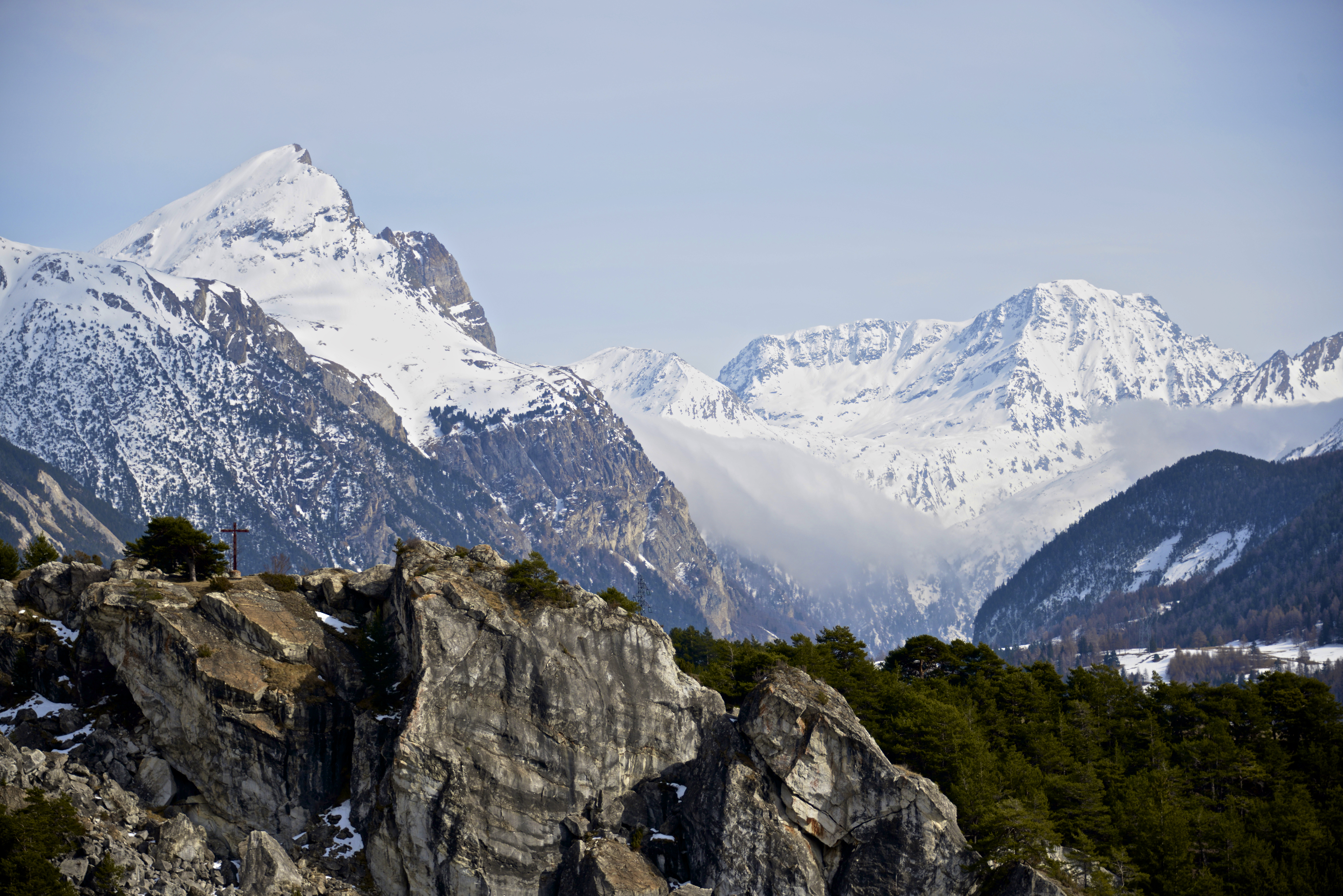 Pointe de Bellecombe, et le Mont Giusalet dans le massif d'Ambin en Haute Maurienne